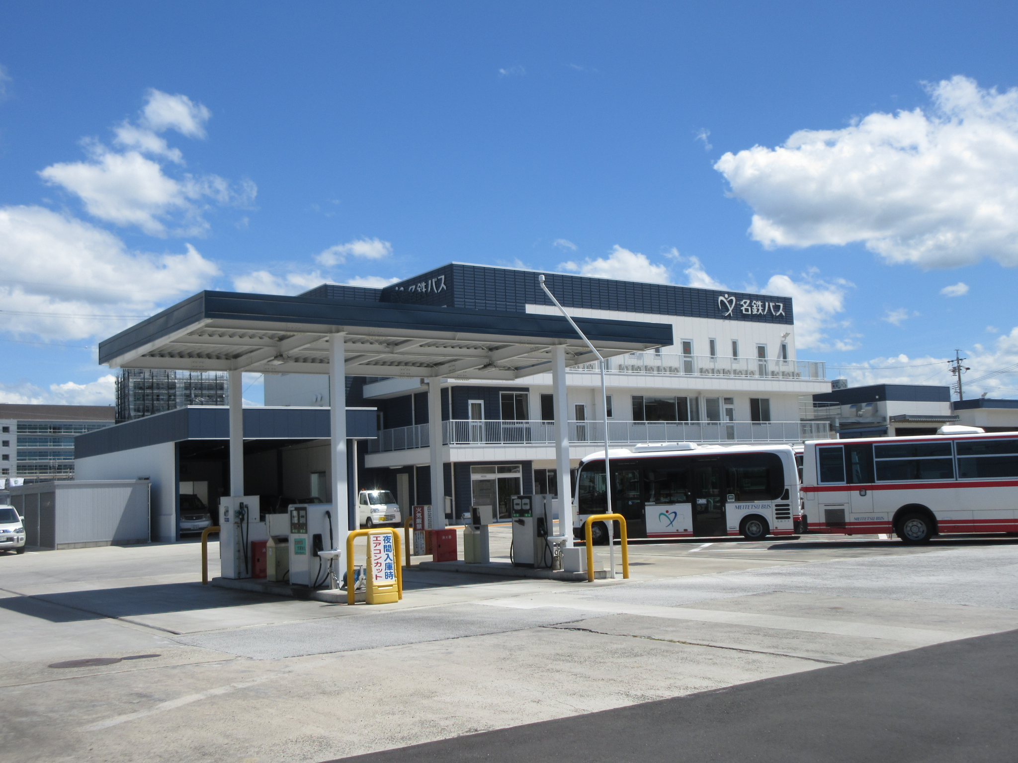 名鉄バス岡崎営業所（岡崎市明大寺町）